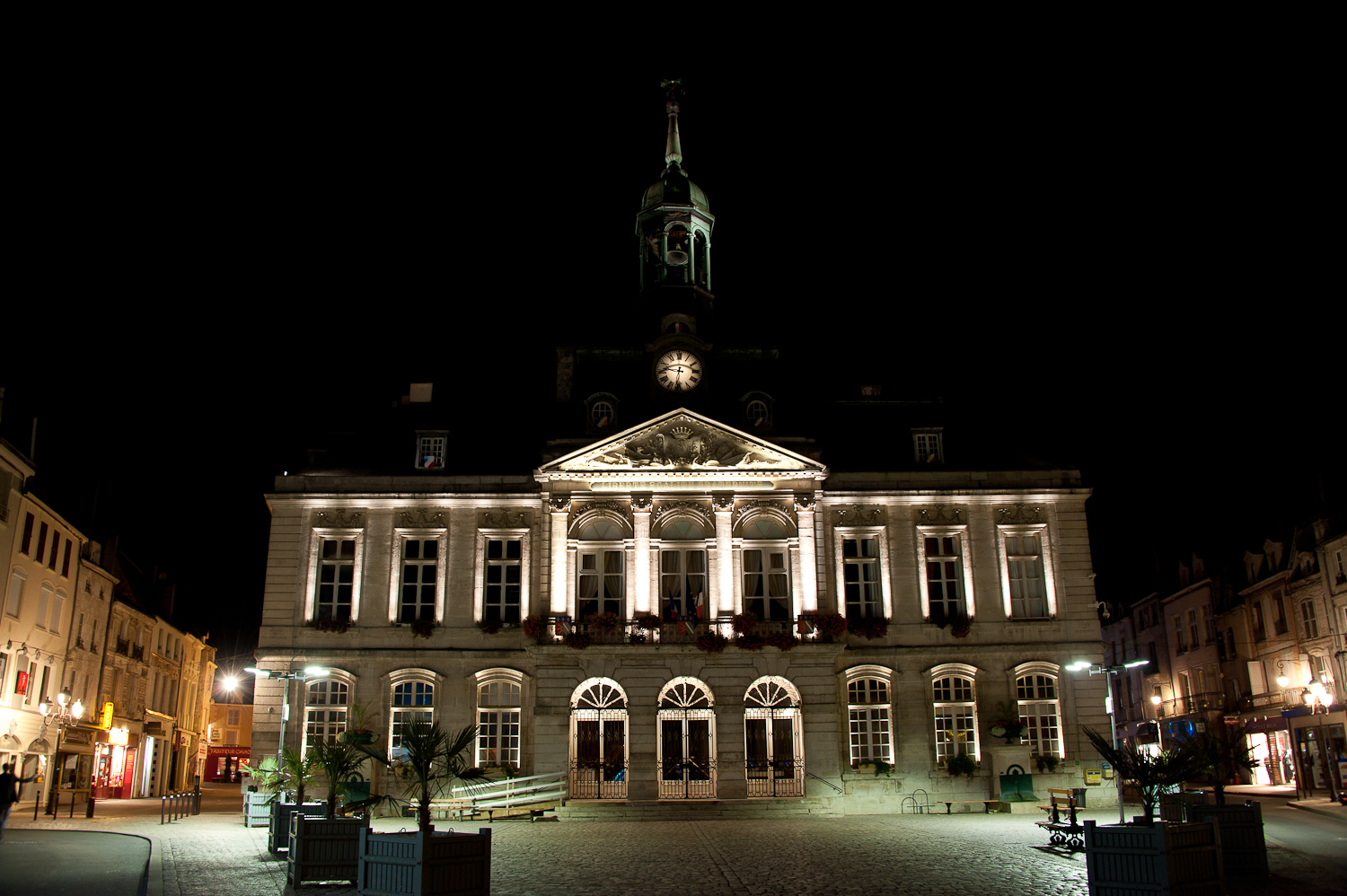 L' Hôtel de Ville, mise en lumière